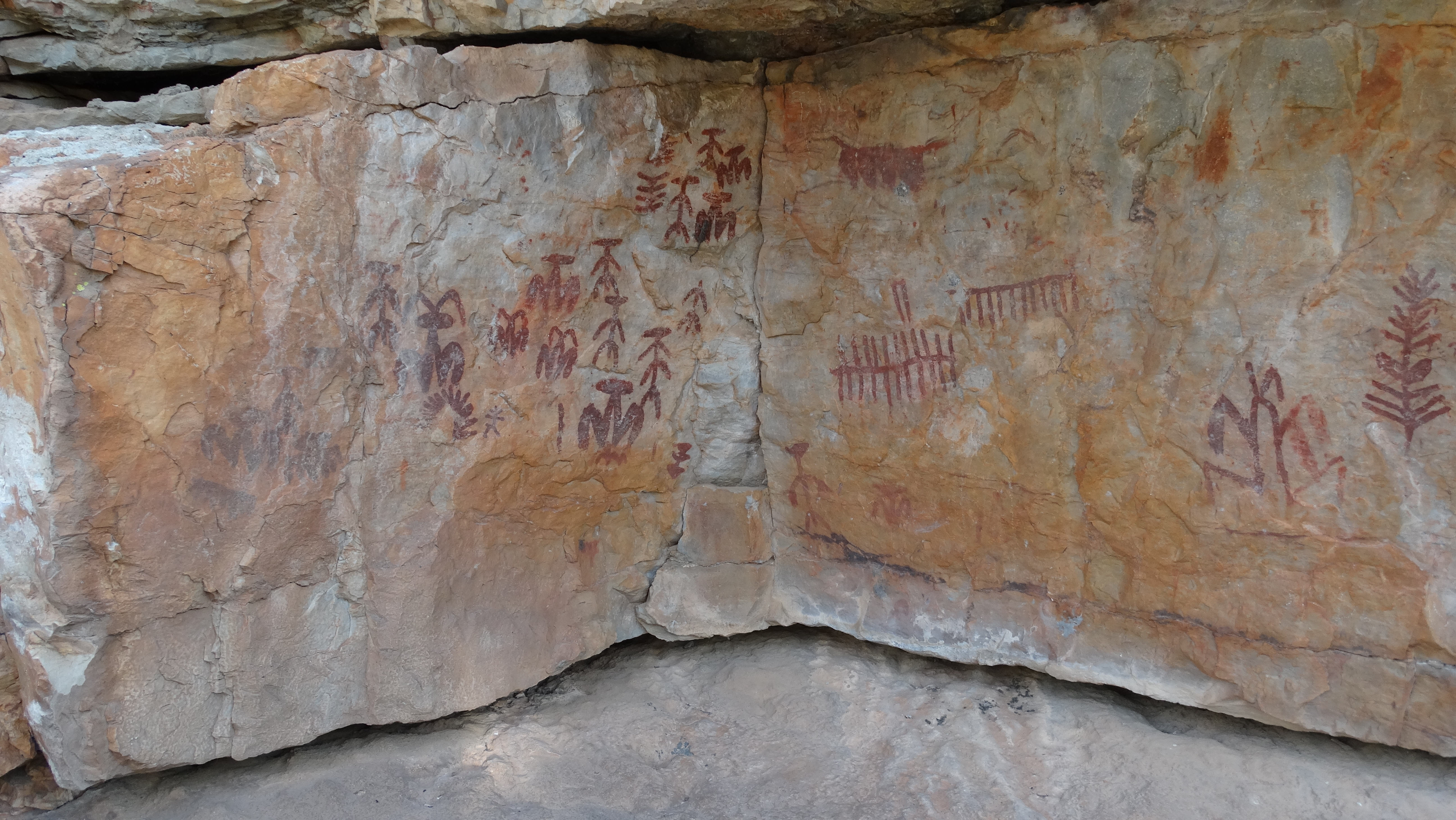 Peña Escrita se conserva el primer grupo de pinturas prehistoricas que se describio en la Peninsula Iberica. Descurbiertas en 1783